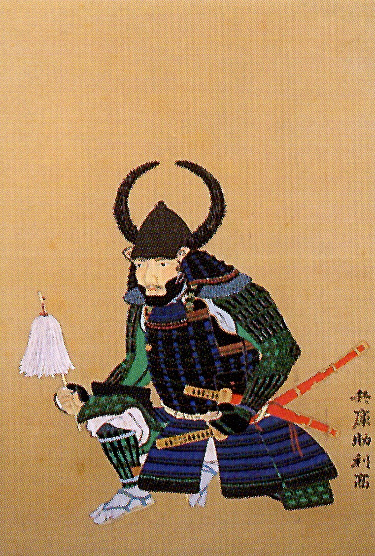 黒田利高の肖像。